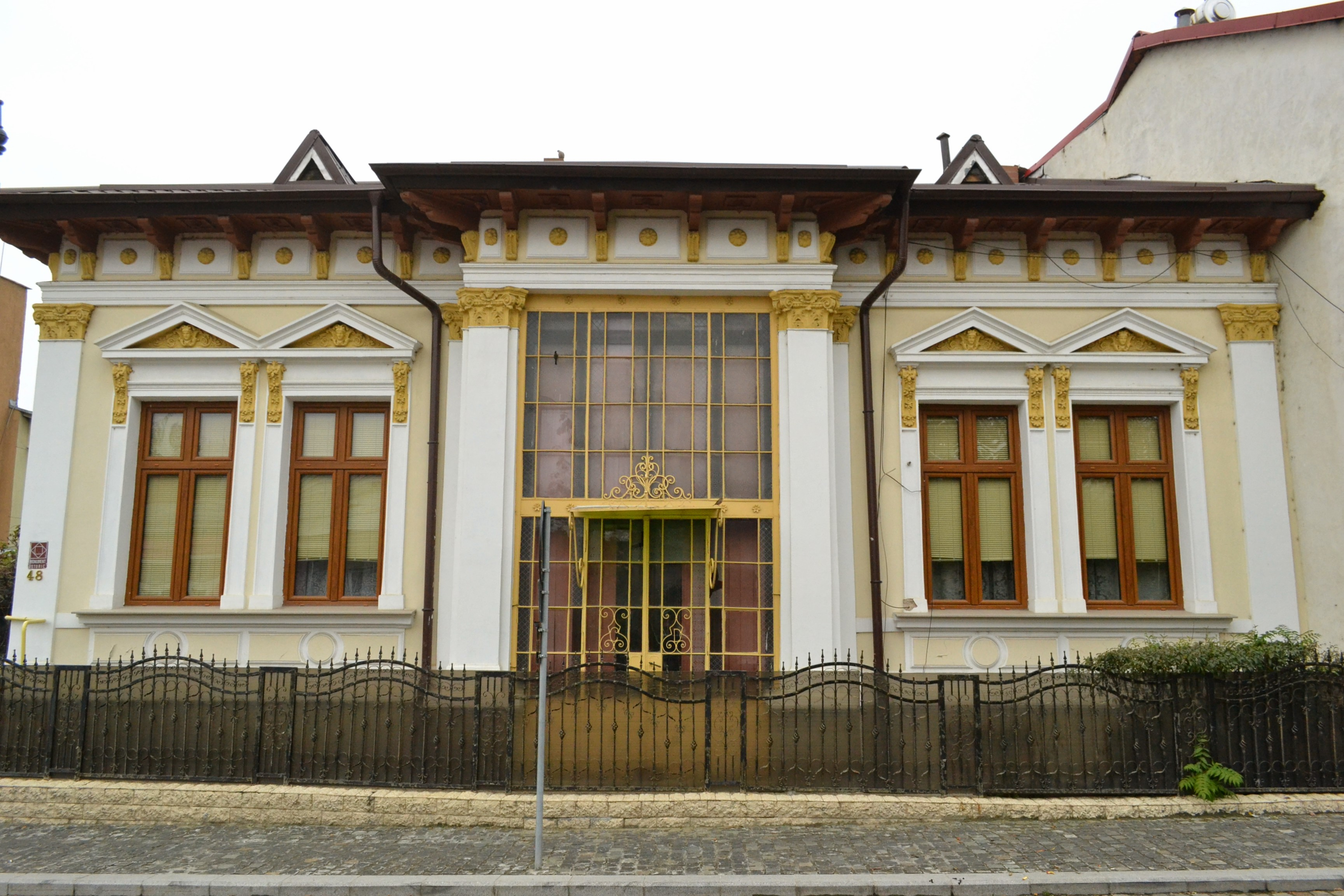 Casa Stănculescu din Slatina în 2014.